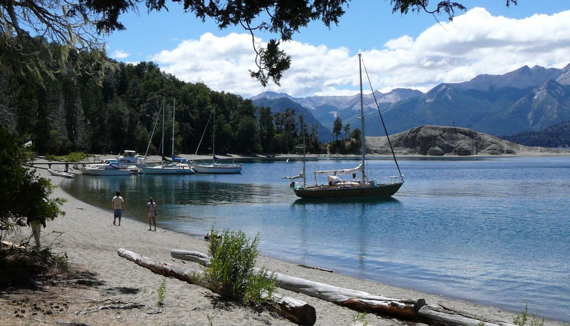 Bahia Piedras Blancas en la isla Victoria, provincia del Neuquen, Argentina